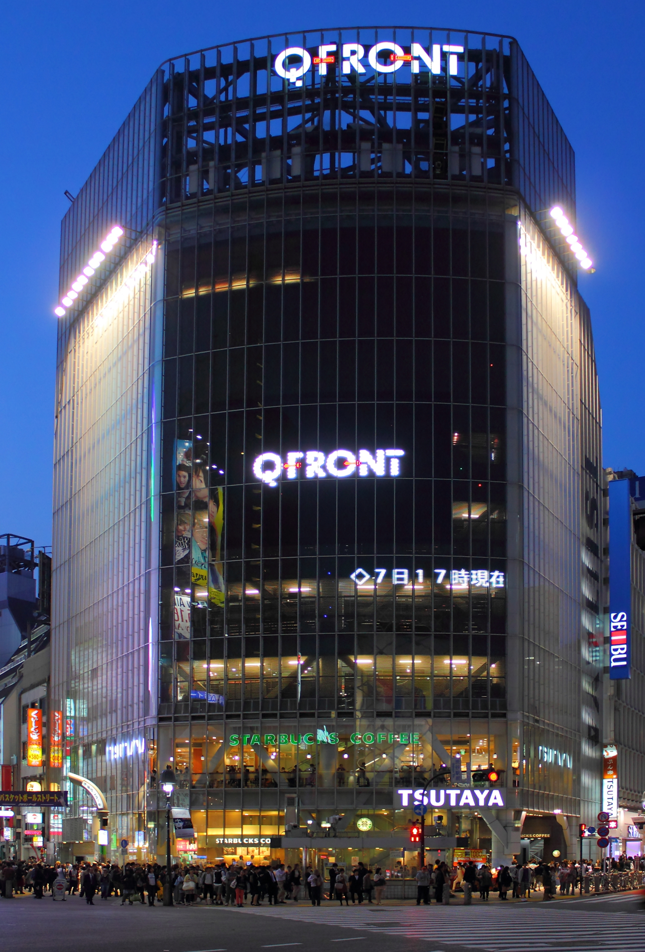 Q-Front（東京都渋谷区）